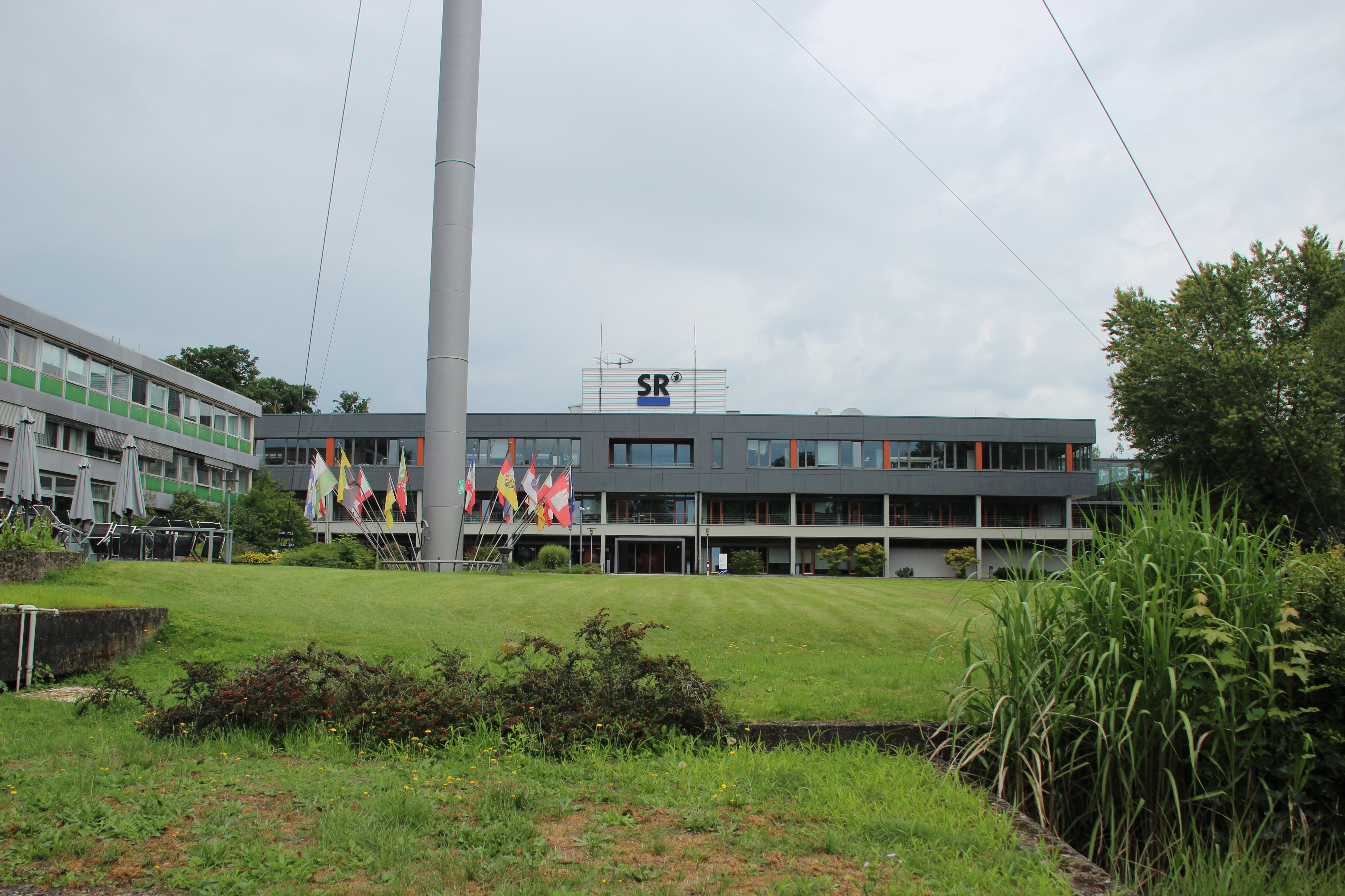 Bildinhalt: Gelände und Gebäude des Saarländischen Rundfunks auf dem Halberg Aufnahmeort: Saarbrücken, Deutschland